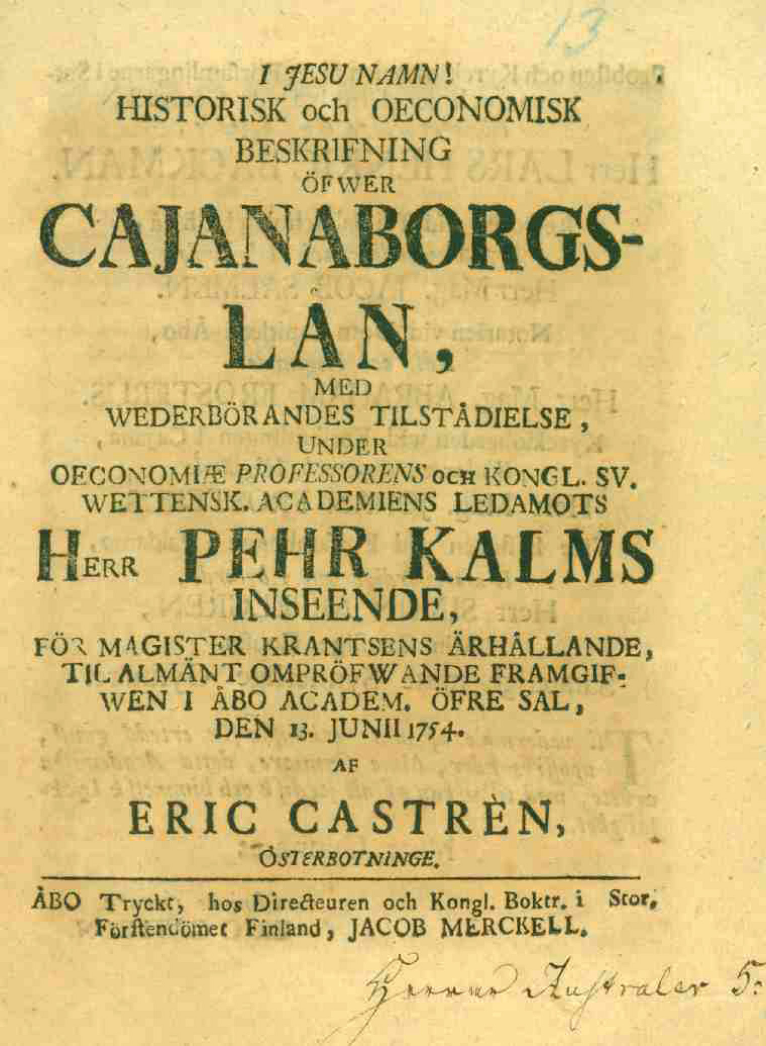 Eric Castrénin väitöskirja vuodelta 1754.